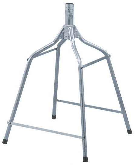 投稿者自身による作品